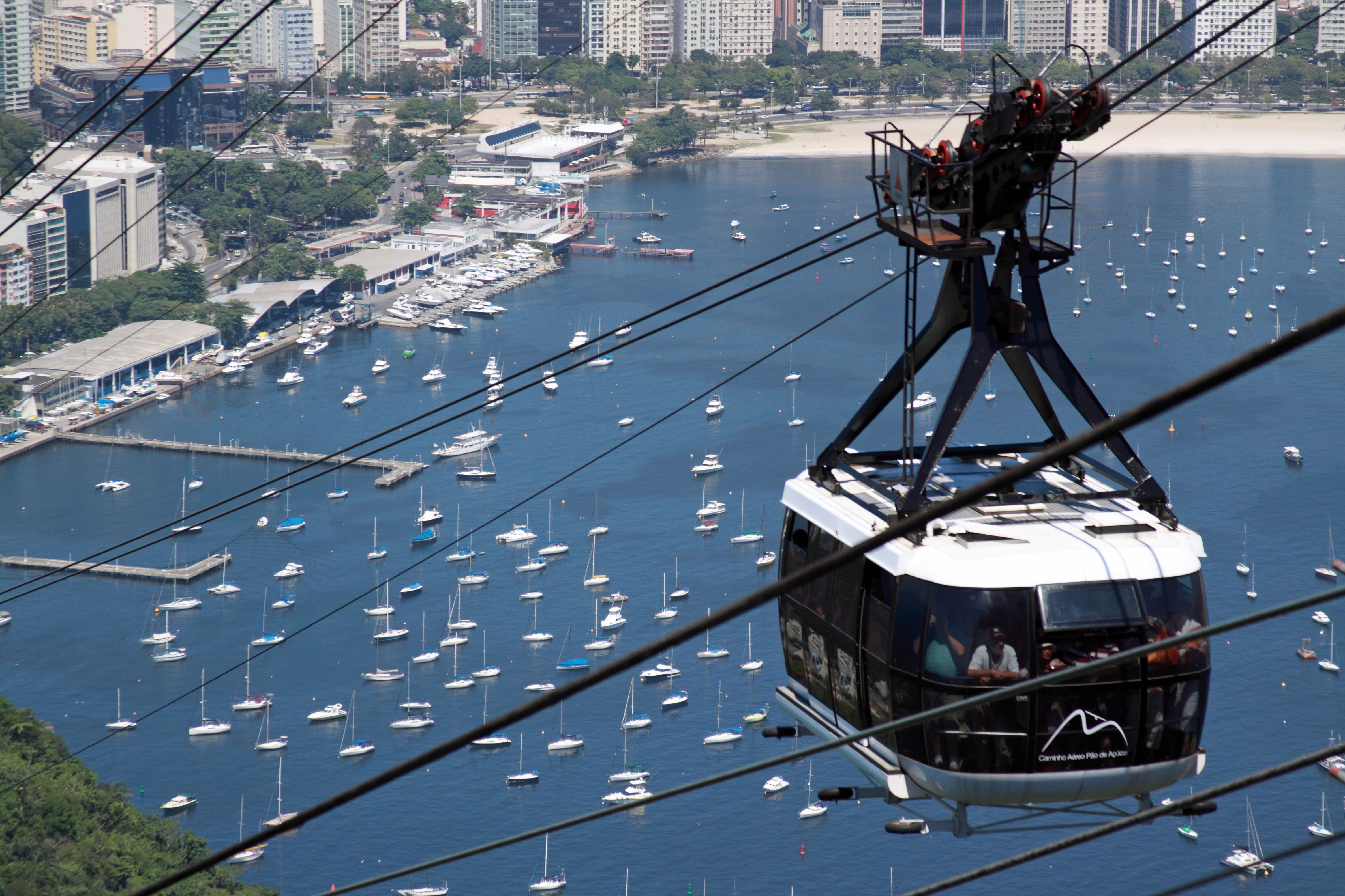 Bondinho chegando na Estação do Pão de Açúcar vendo-se embaixo o Iate Clube do Rio de Janeiro, a Piscina do Botafogo e a Praia de Botafogo.